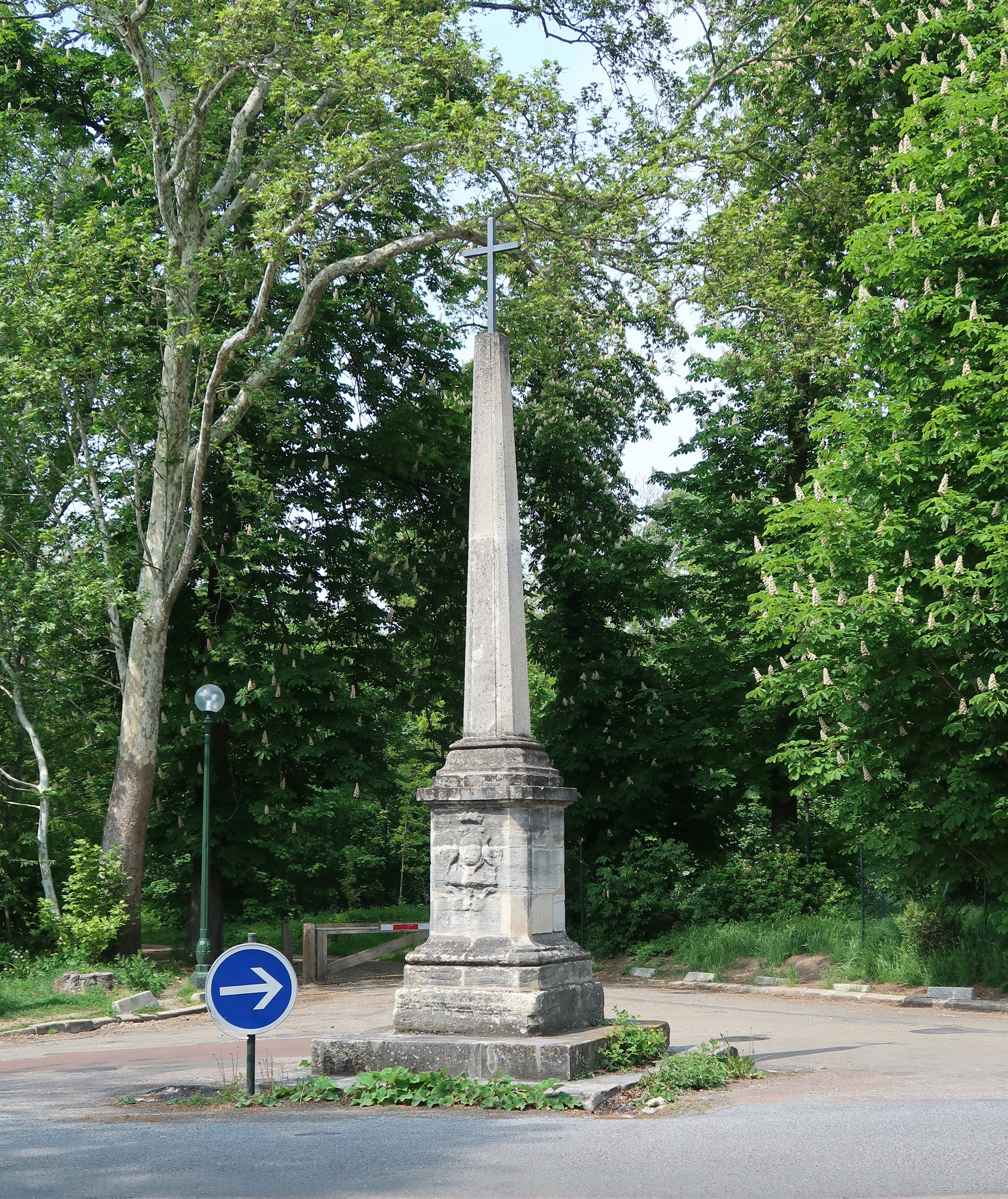 Croix aux abords du jardin du Pré-Catelan, bois de Boulogne, sous la neige (Paris, 16e).